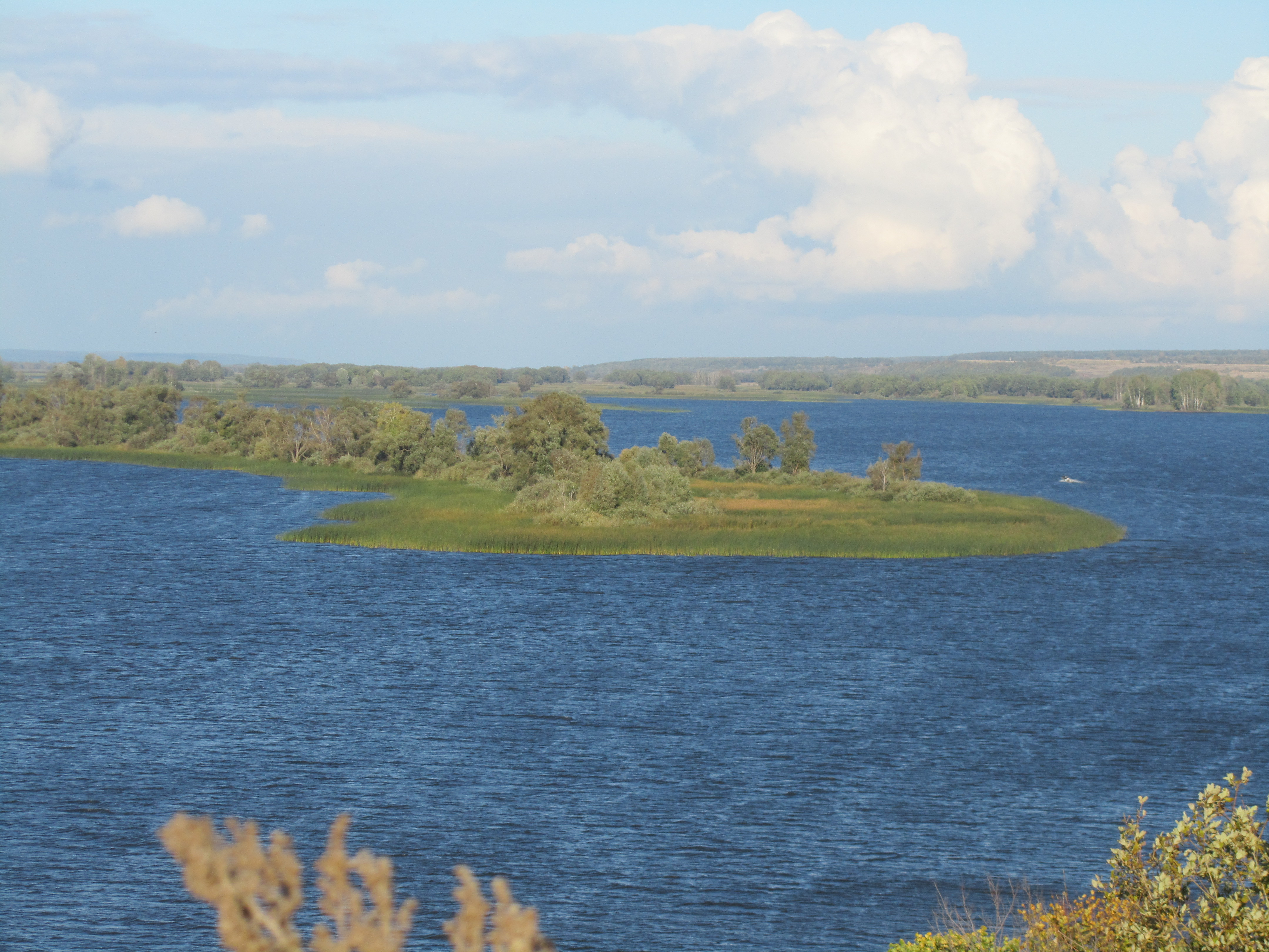 "Подкова". Кама (Прость). Змиево. Татария. Октябрь 2012